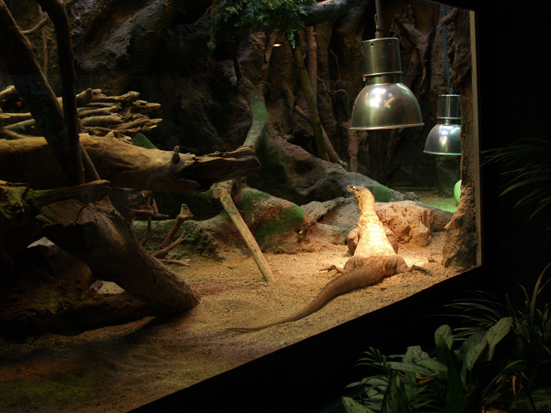 Un dels dragons de Komodo al terrari del zoo de Barcelona